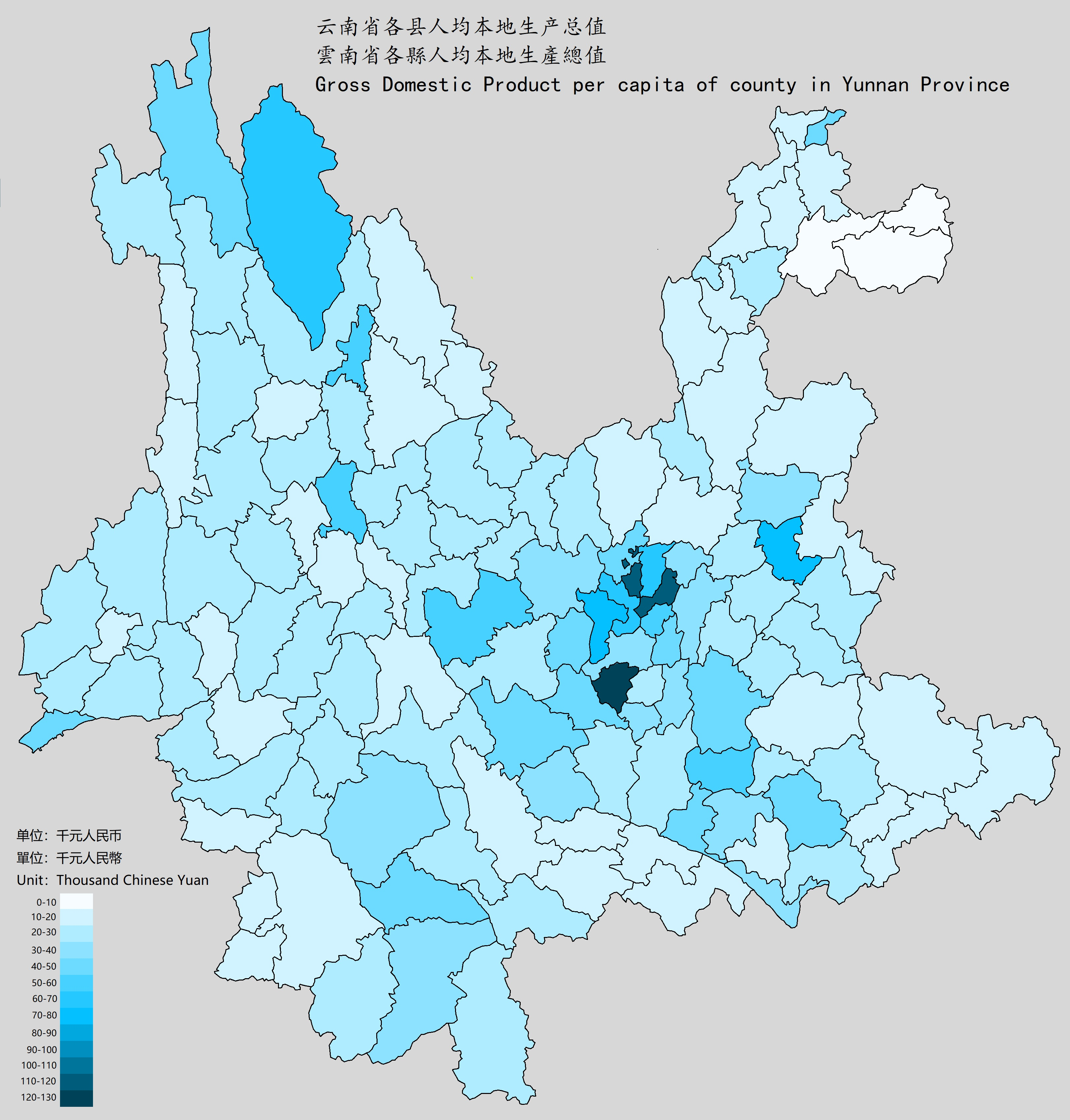 中文（中国大陆）: 云南省各县人均GDP